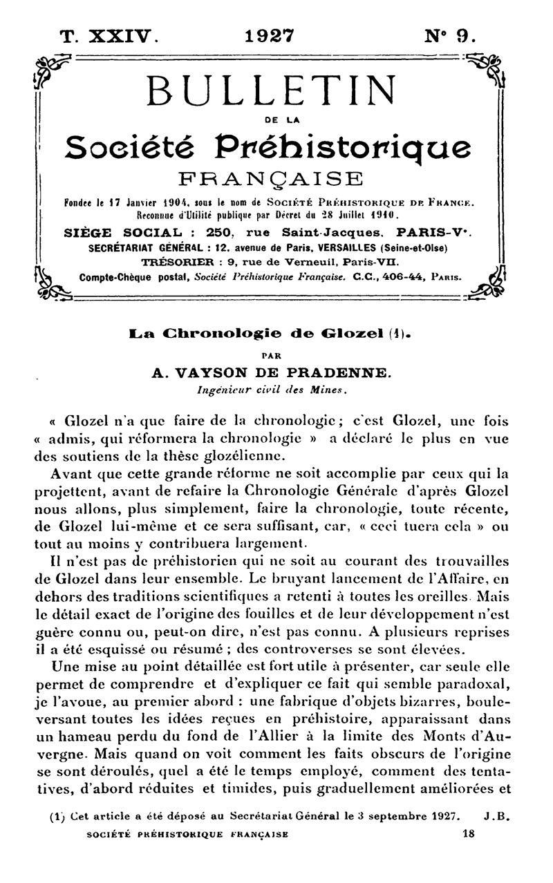 page extraite du Bulletin de la Société préhistorique française de 1927, tome 24, n° 9.